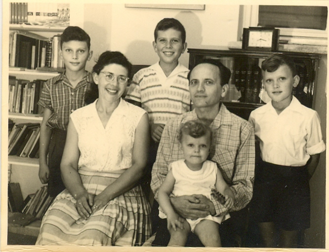 שמואל וחוה בן ארצי וארבעת ילדיהם, 1960. הילדים: מימין (ליד האב) אמציה, משמאל חגי, במרכז מתניה ועל ברכי האב שרה.